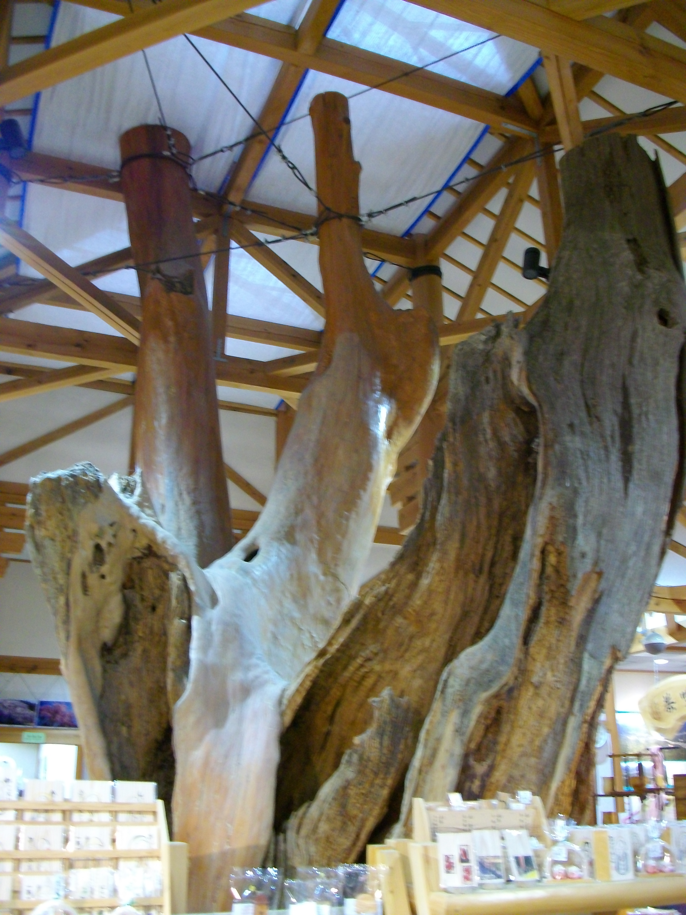 道の駅ウッディー京北のシンボルとして店内の中央にそびえる台杉です。